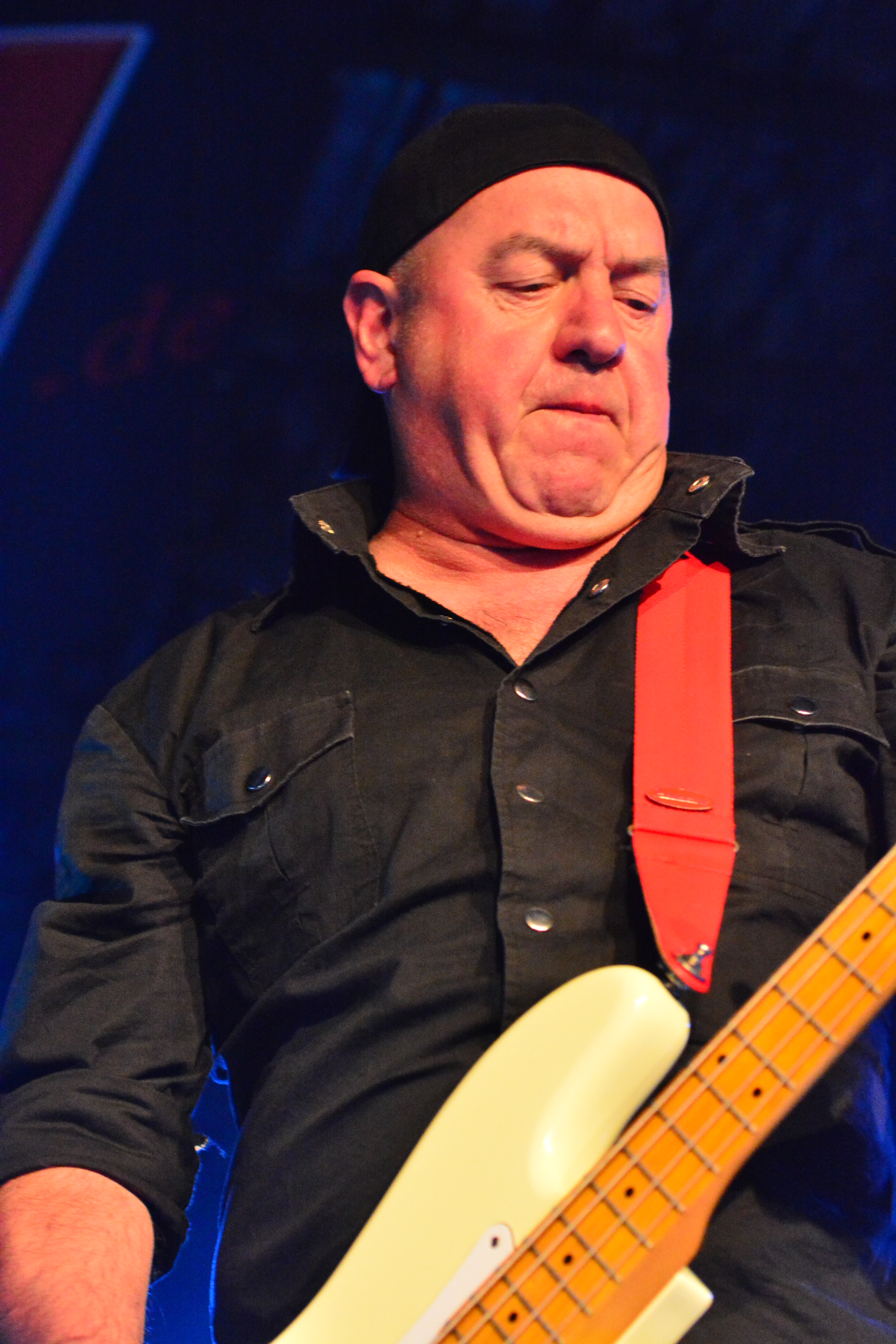 Steve Dawson von Oliver/Dawson Saxon beim Headbangers Open Air 2014